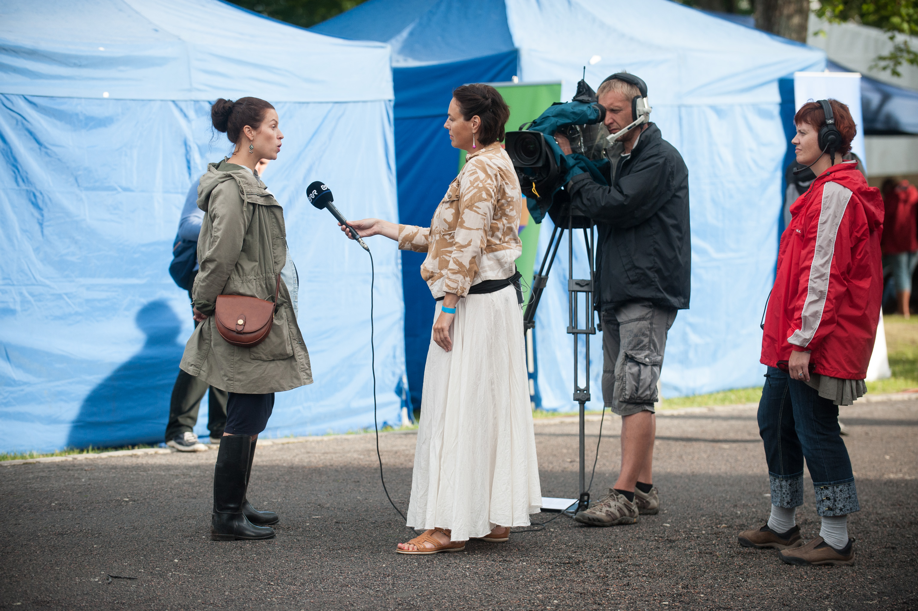 Arvamusfestival 2014